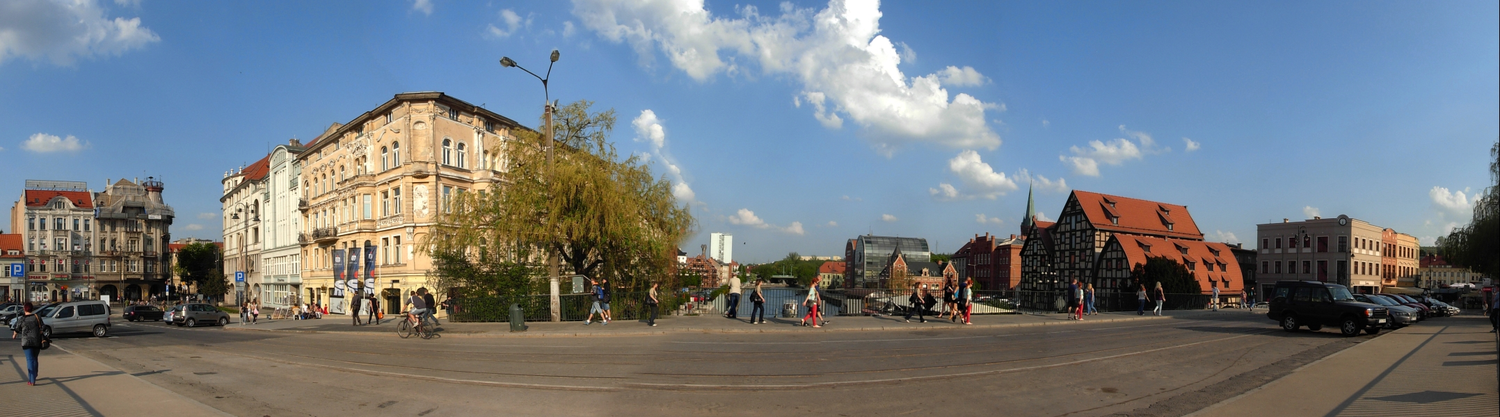 Most Staromiejski im. Jerzego Sulimy-Kamińskiego nad Brdą w Bydgoszczy